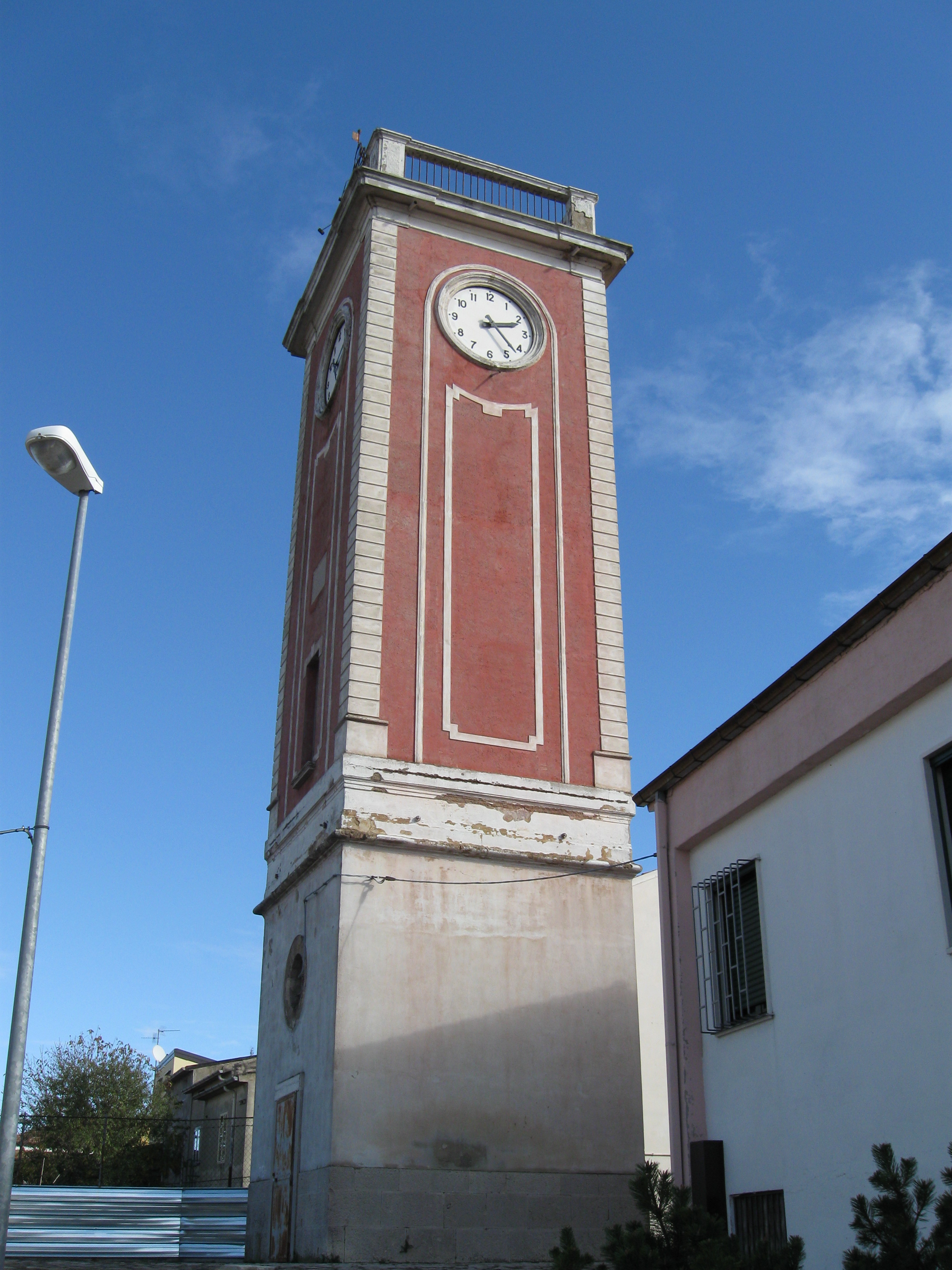 Orologio del Rione Costa, Rionero in Vulture, Basilicata